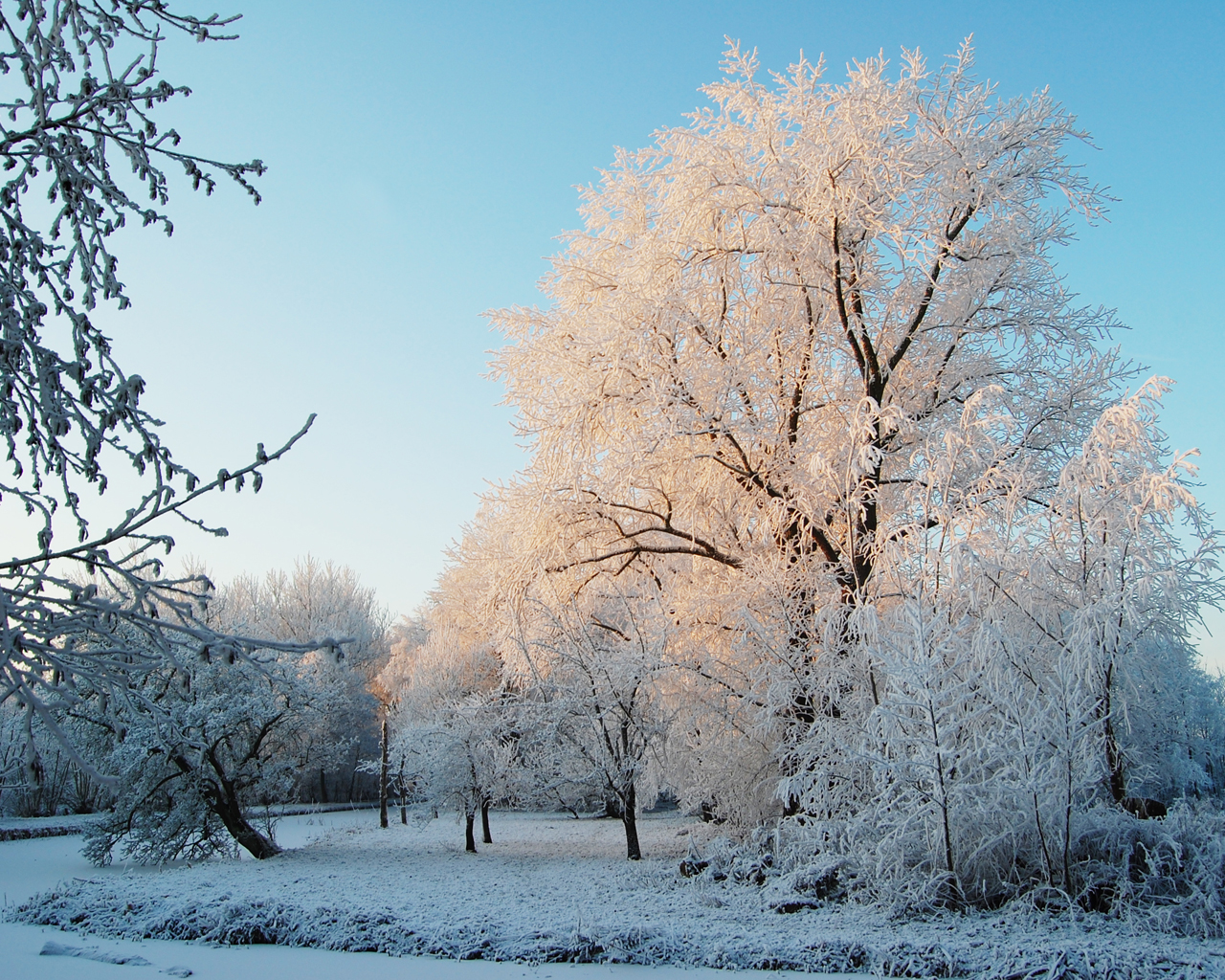 Sneeuw-Weegje